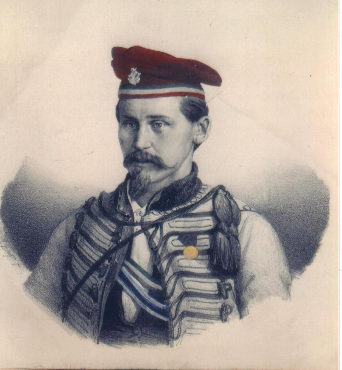 Daguerreotype von August Wittich (1826–1897)